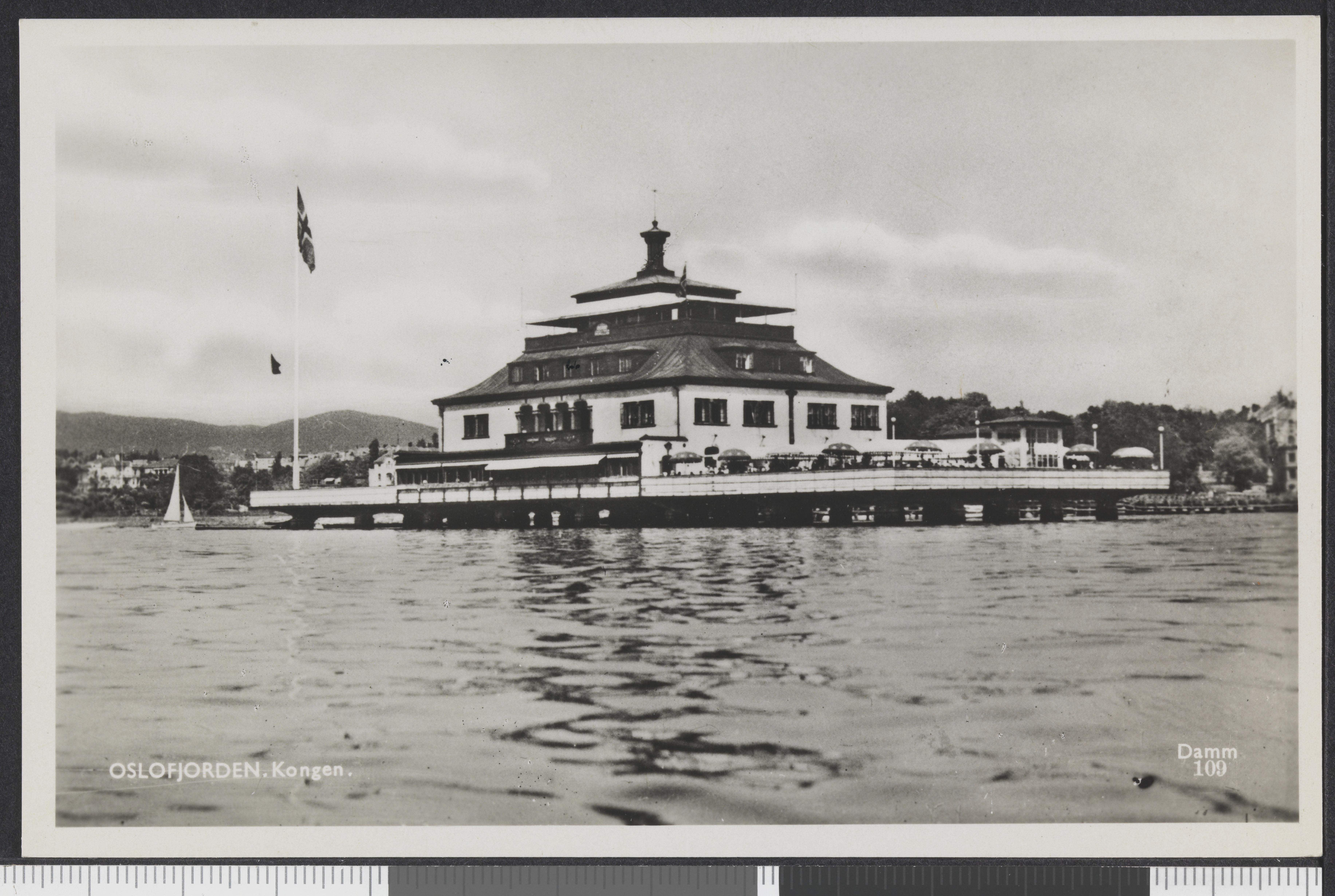 Bildet er hentet fra Nasjonalbibliotekets bildesamling Frognerkilen,Kongen, Oslo, Oslo